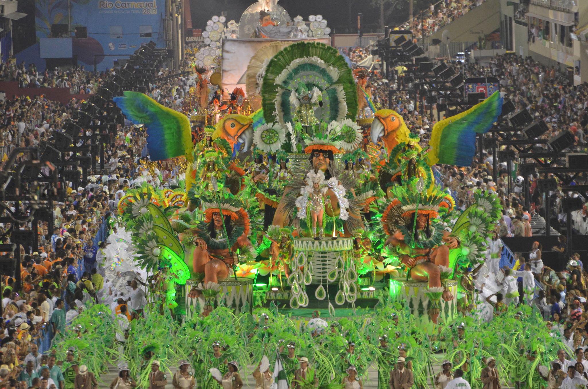 Rio de Janeiro - Primeiro dia de desfile das escolas de samba da Série A, antigo Grupo de Acesso, na Sapucai. (Alexandre Macieira/Agência Brasil)